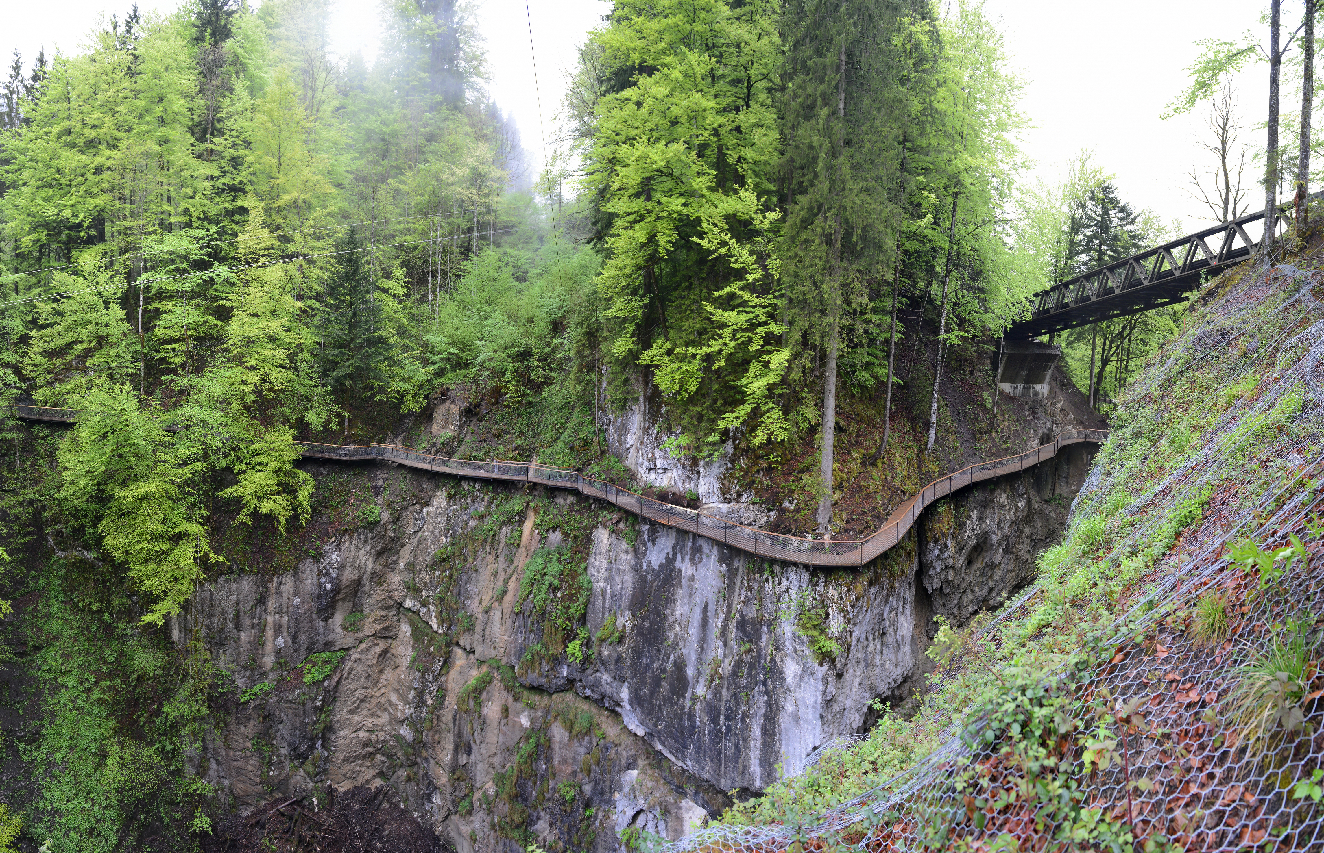 Am 10. Mai 2011 stürzte die Rappenlochbrücke infolge eines Felssturzes unter der Brückenauflage ein. Die Pionierkompanie (gebbwgl)/PiB2 des Österreichischen Bundesheeres errichtete mit ca. 70 Pionieren und Offizieren hier eine Krupp-D-Brücke. Der verschüttete Weg in der Schlucht wurde nun durch eine Steganlage ersetzt.